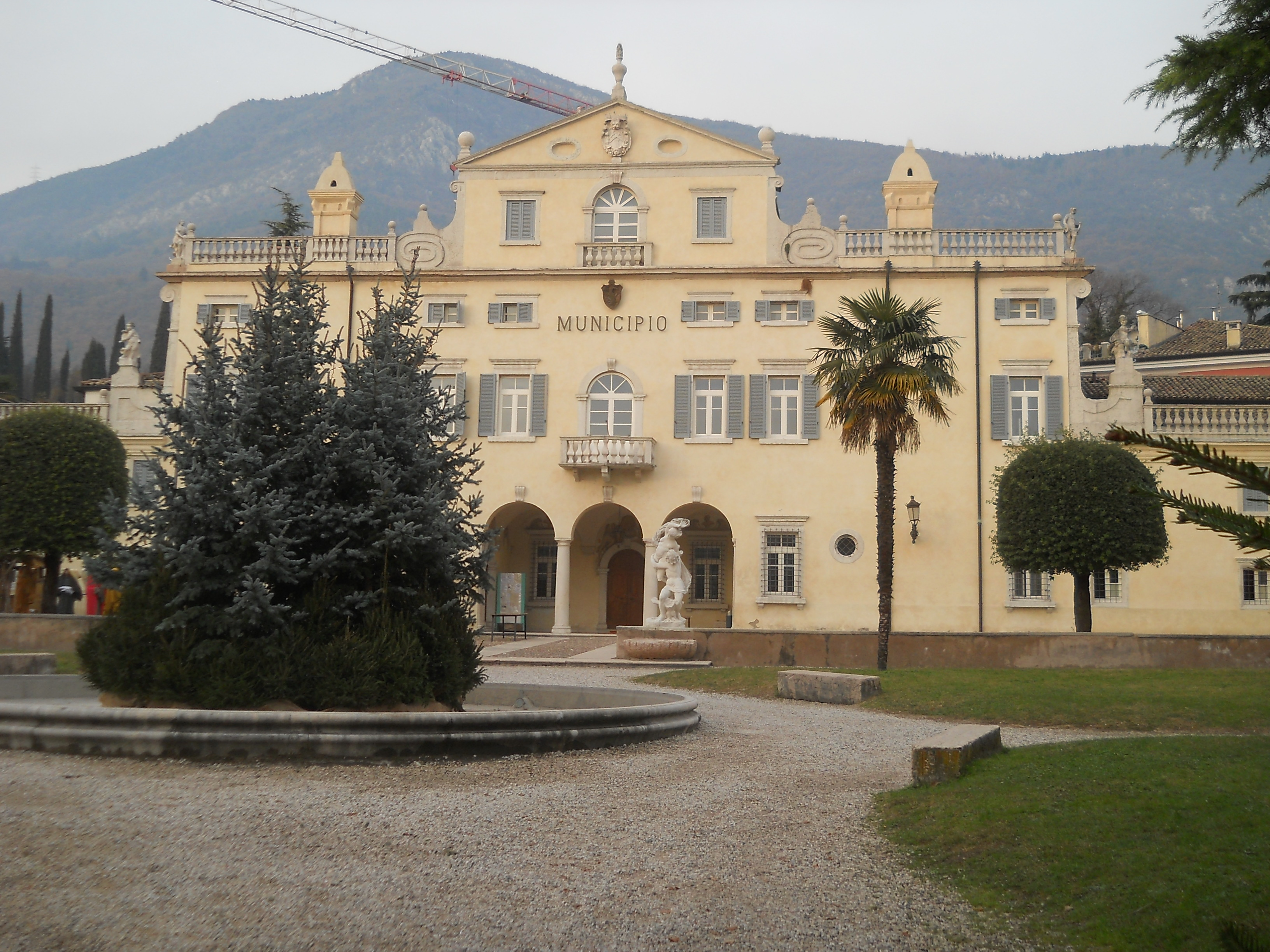 Facciata dell'edificio comunale di Caprino Veronese